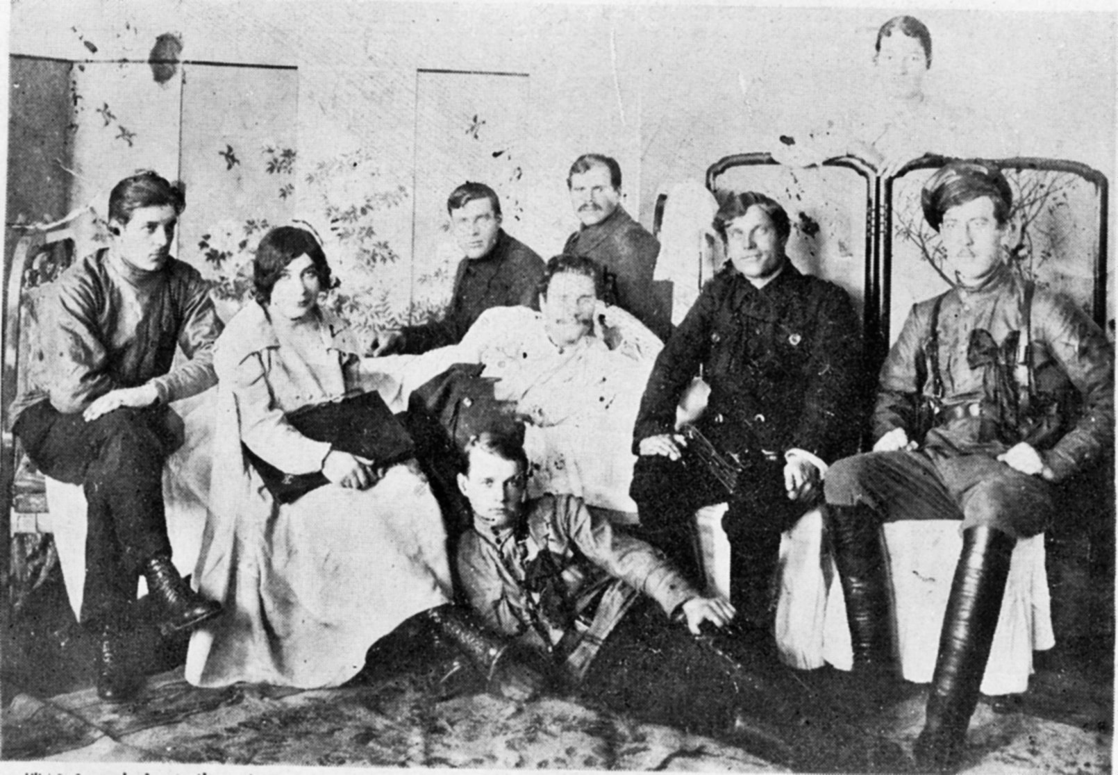 Yakov Triapitsyn（ヤコブ・トリャピーチン ） and his partisans （Nikolayevsk Incident 尼港事件）